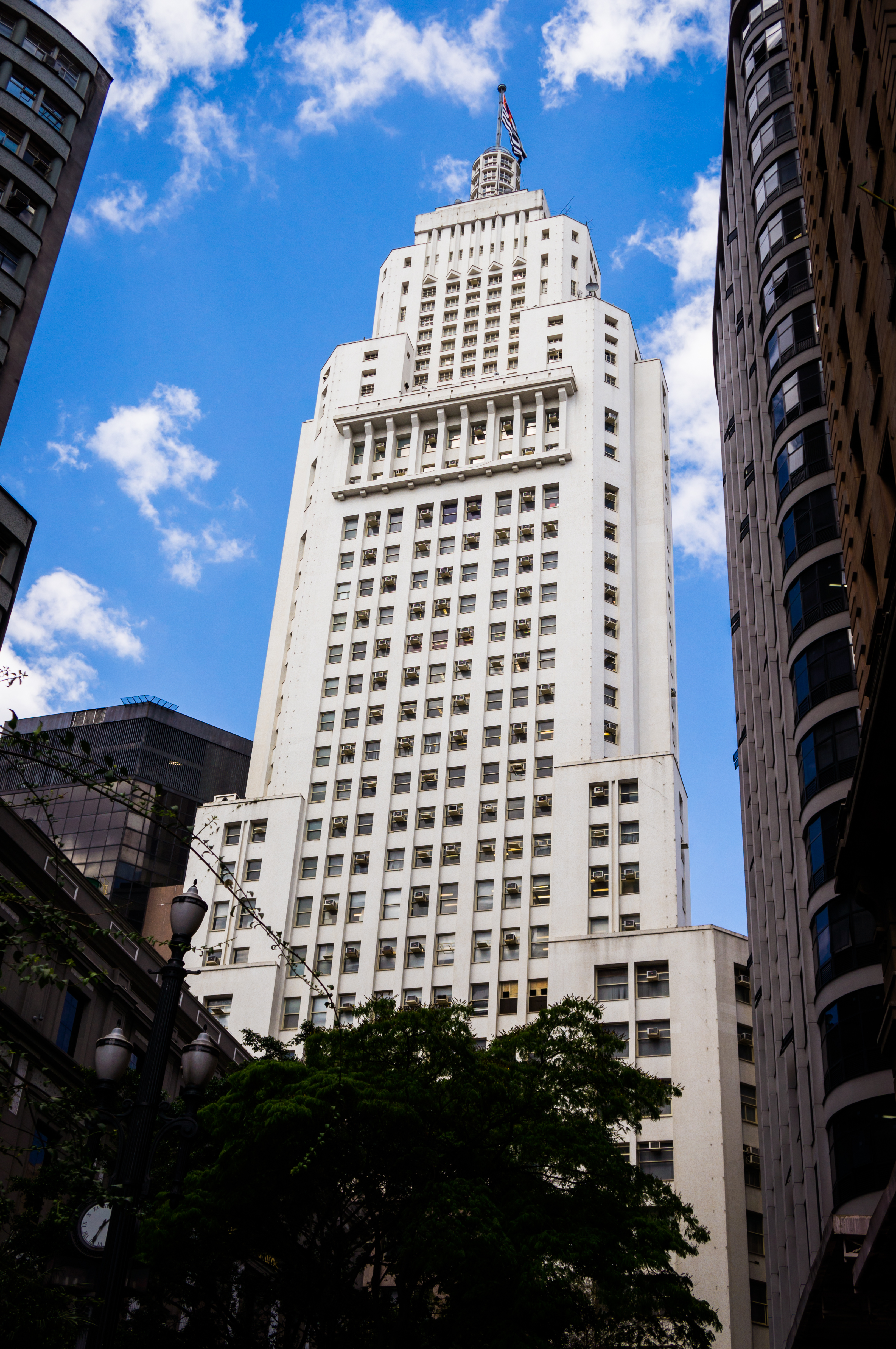 Edifício Altino Arantes / Altino Arantes Building